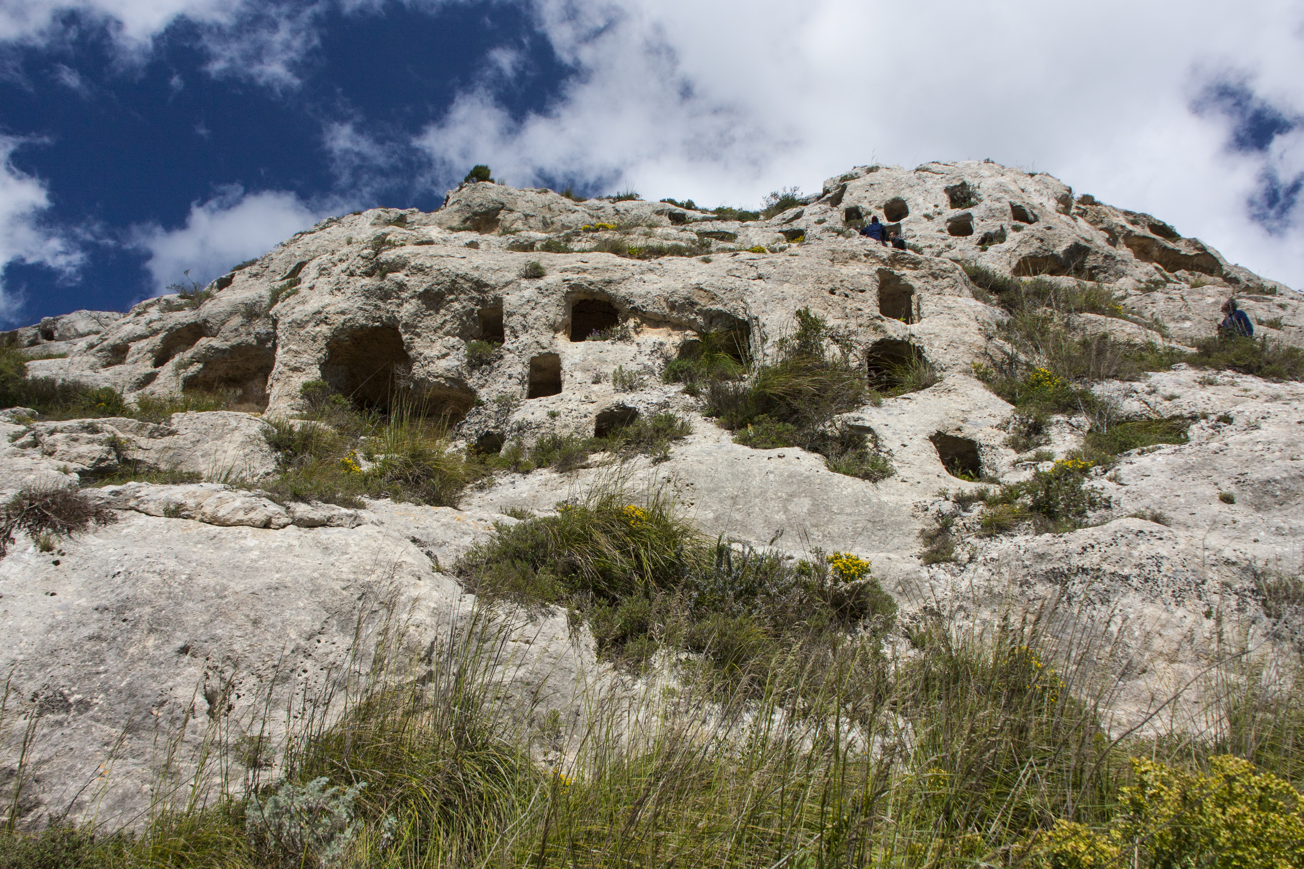 Necropoli di Realmese